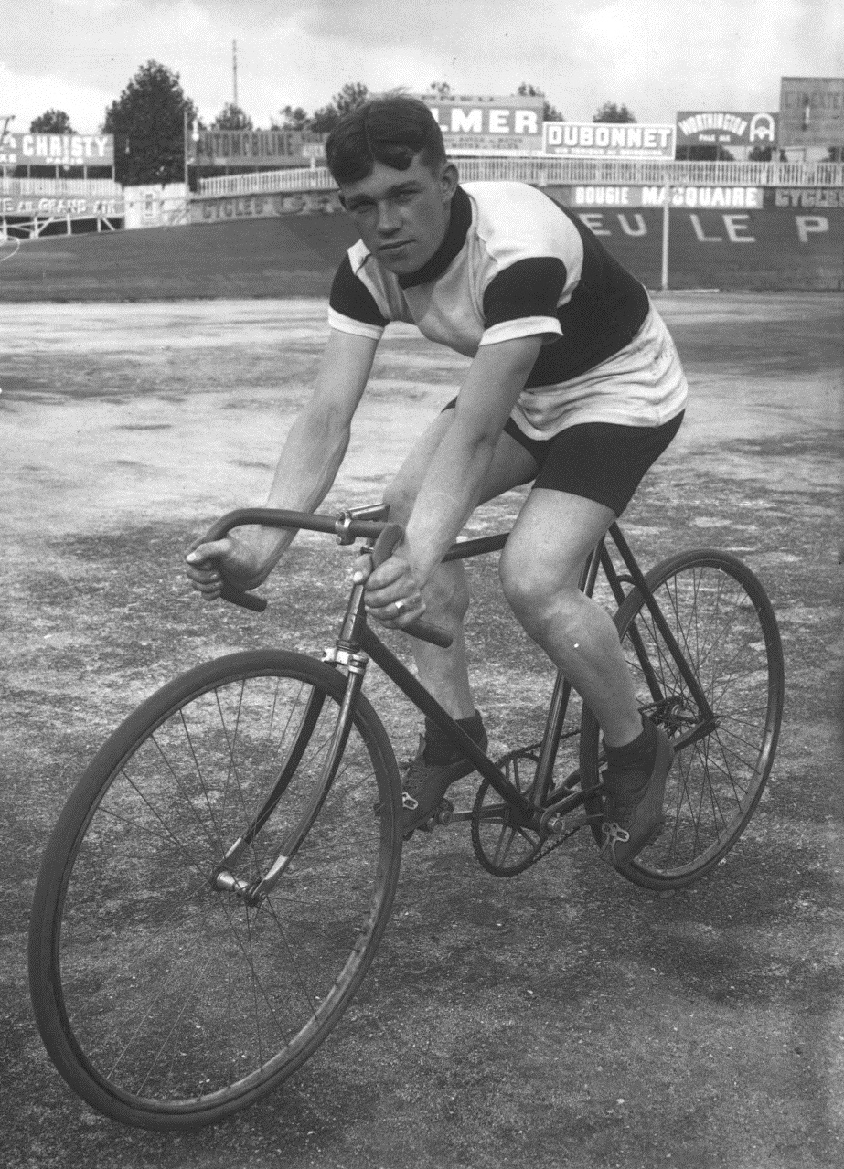 Frank Henry (Cyclisme), portrait du coureur cycliste sur son vélo